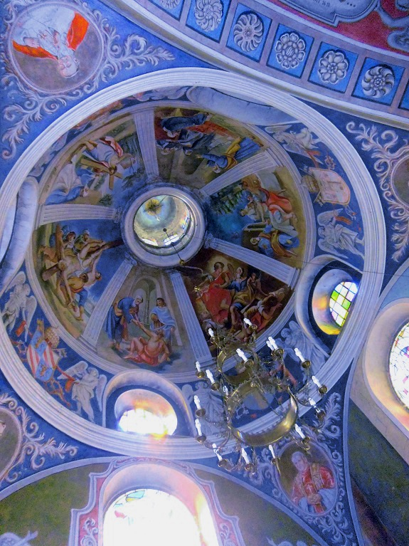 Kopuła w kaplicy św. Piotra w kościele św. Wojciecha w Brdowie (woj. wielkopolskie)